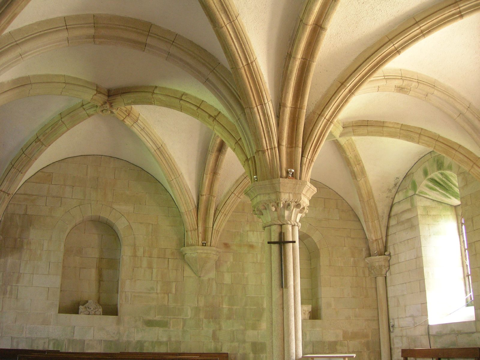 Mosteiro de Santa María de Sobrado dos Monxes